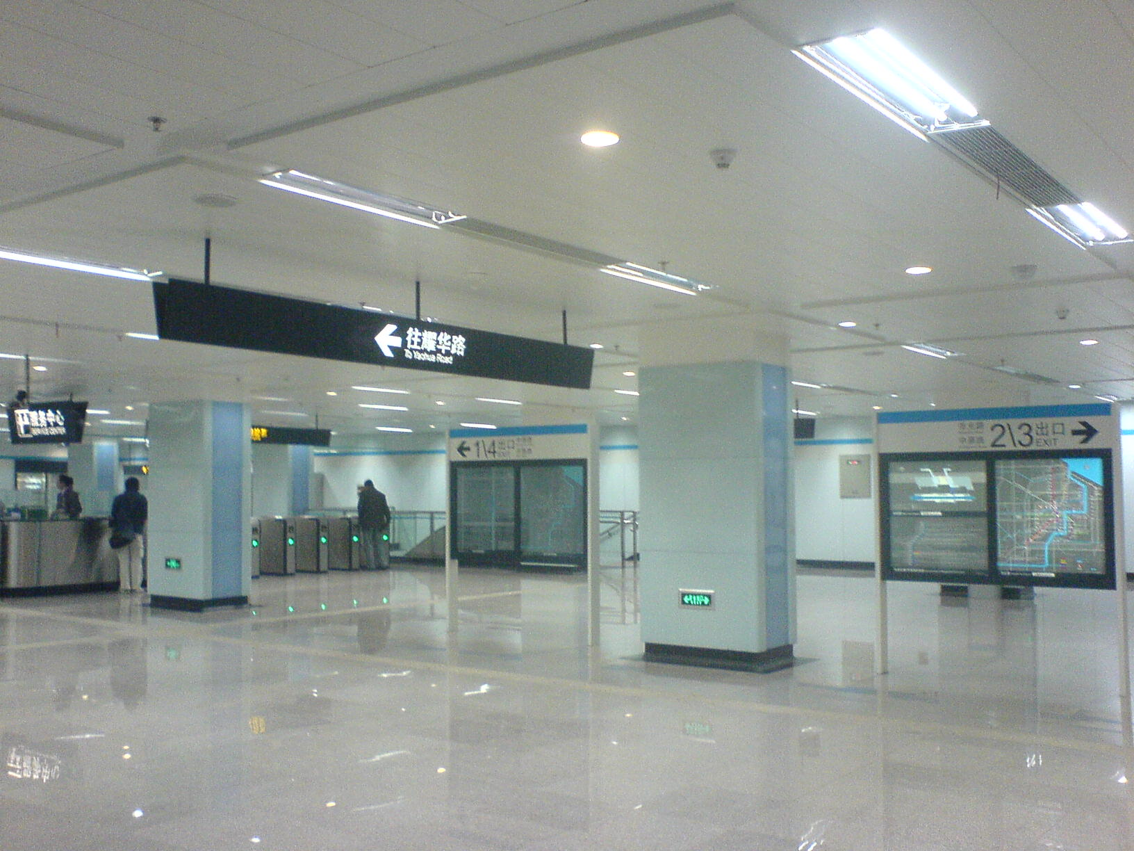 8号线市光路站站台